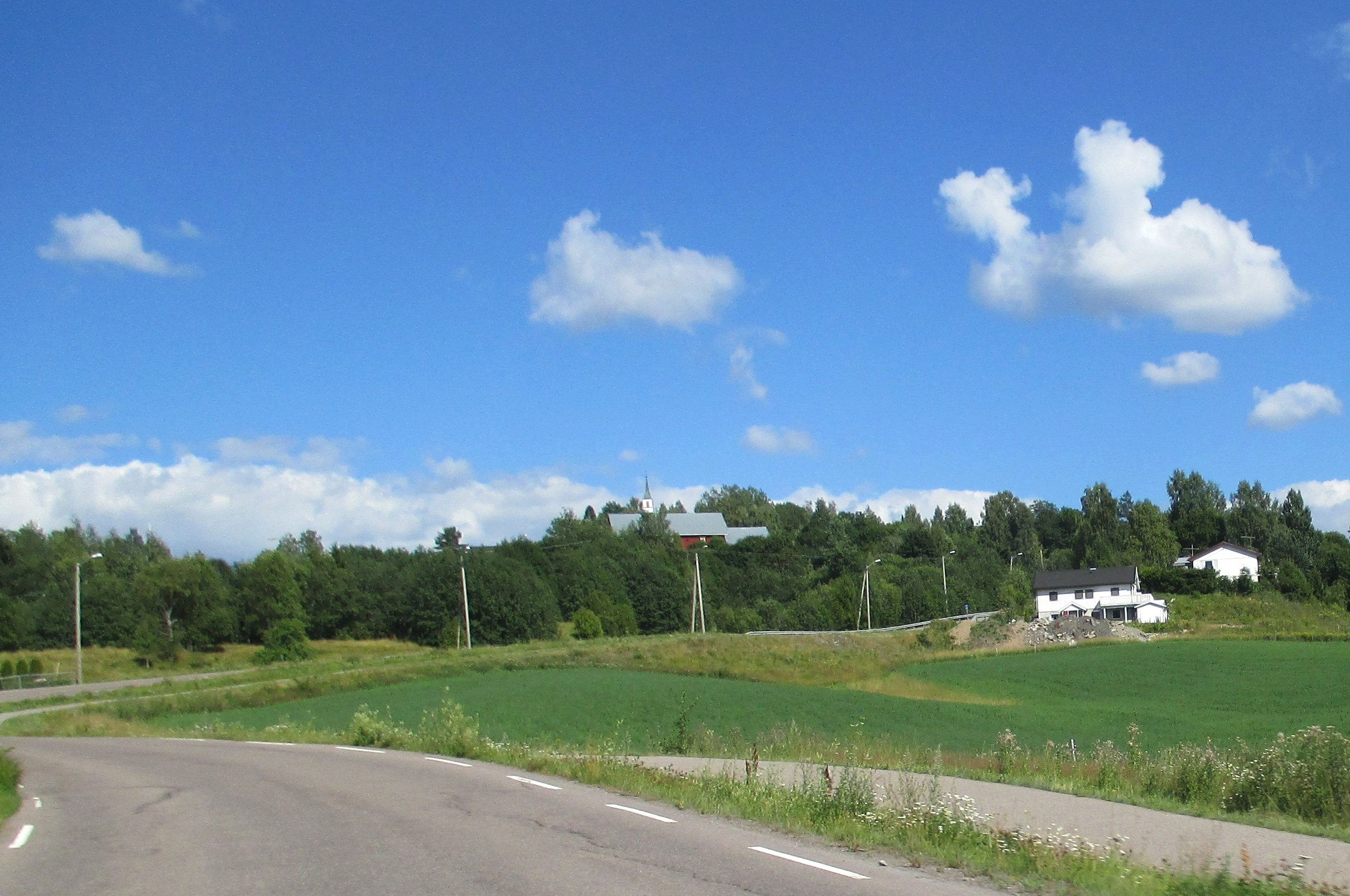 Fylkesvei 401 med Nittedal kirke i bakgrunnen